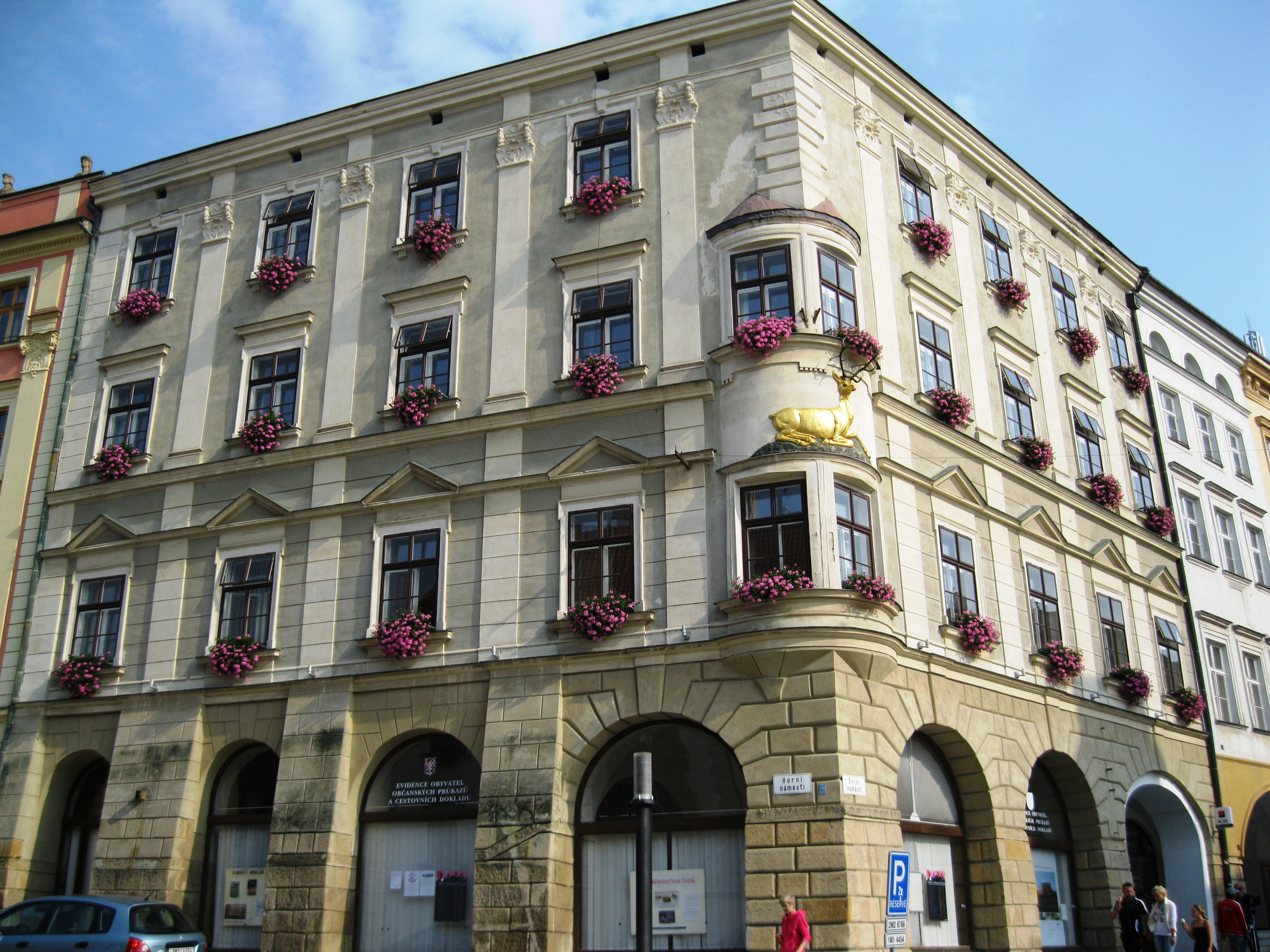 Měšťanský dům U zlatého jelena (Olomouc)